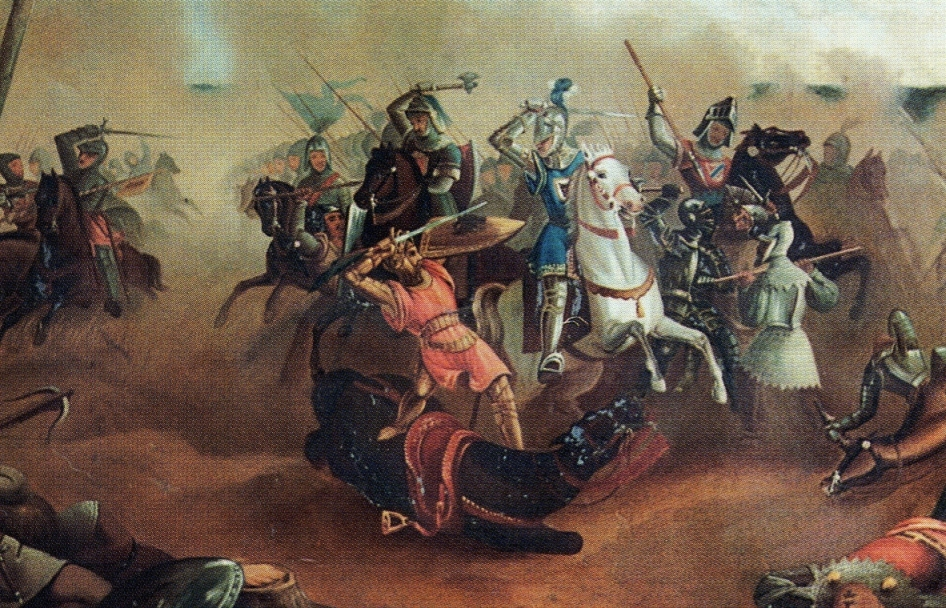 Schlacht bei Mühldorf 1322/Gefangennahme Friederich des Schönen